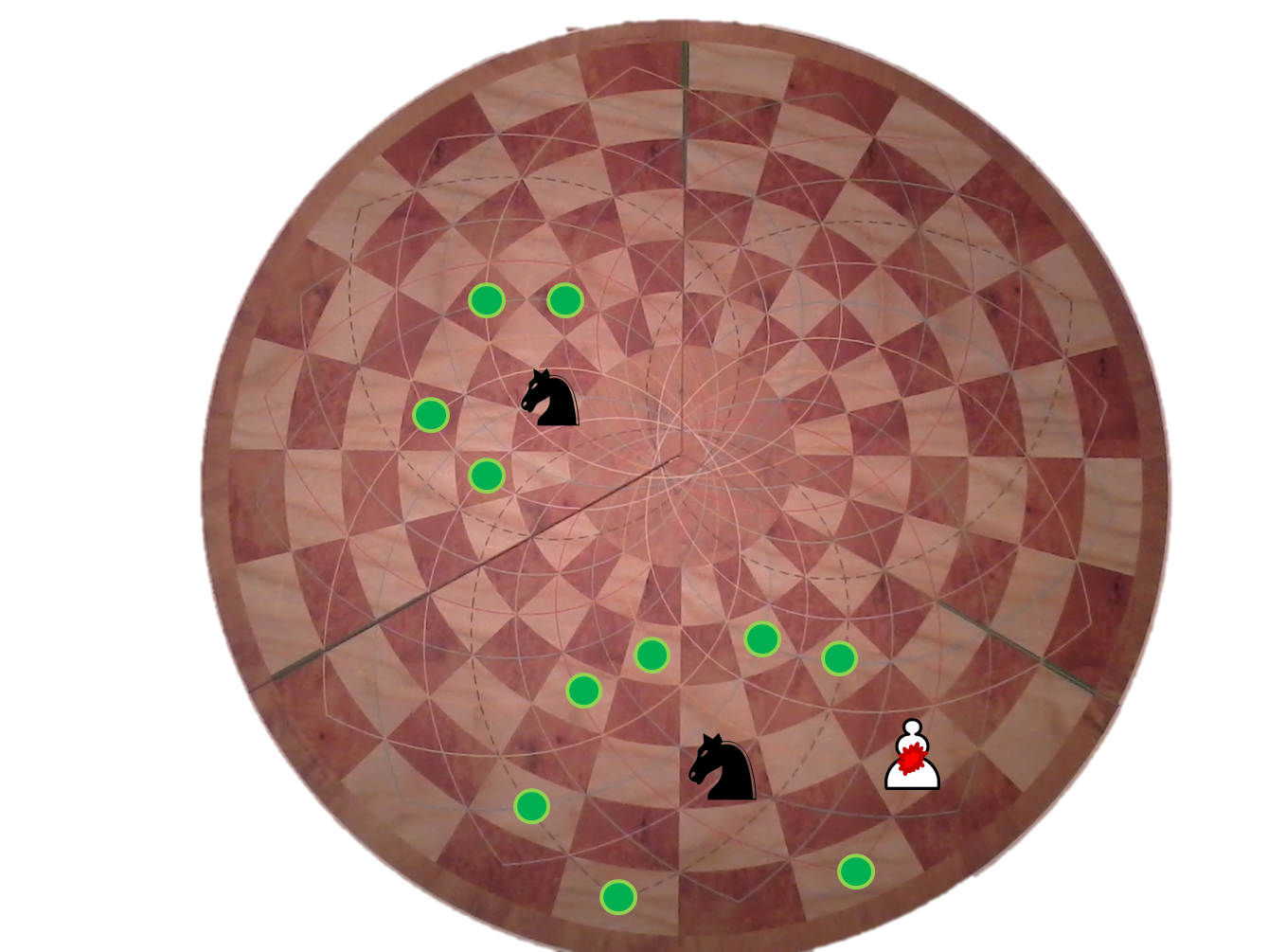 השרטוט מתאר את תזוזת הפרש